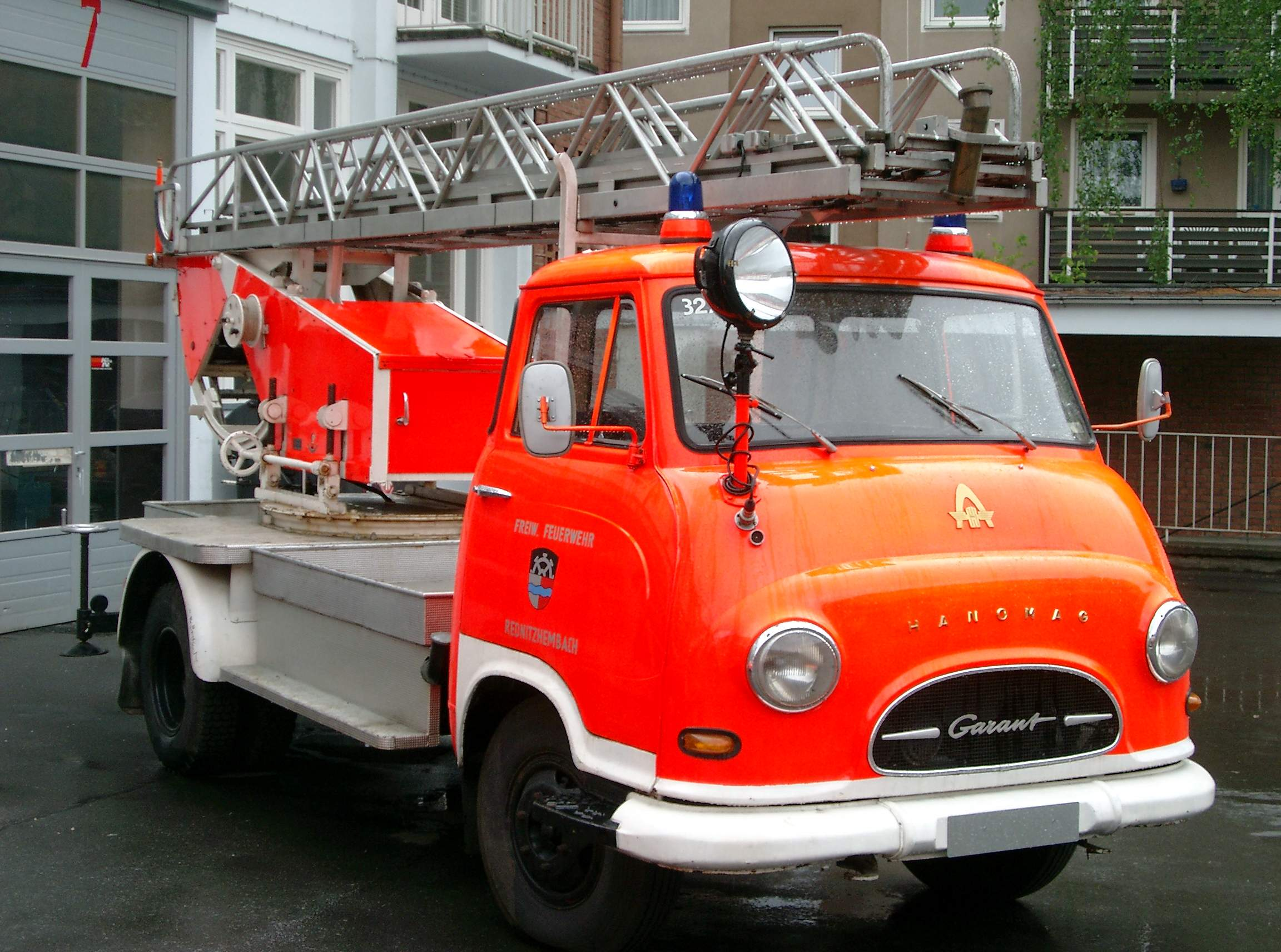 Drehleiter 17 m (ehemals Nachrichtenabteilung BF Nürnberg; FFW Rednitzhembach)